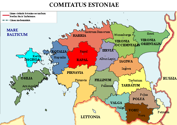 Comitatus Estoniae Latine